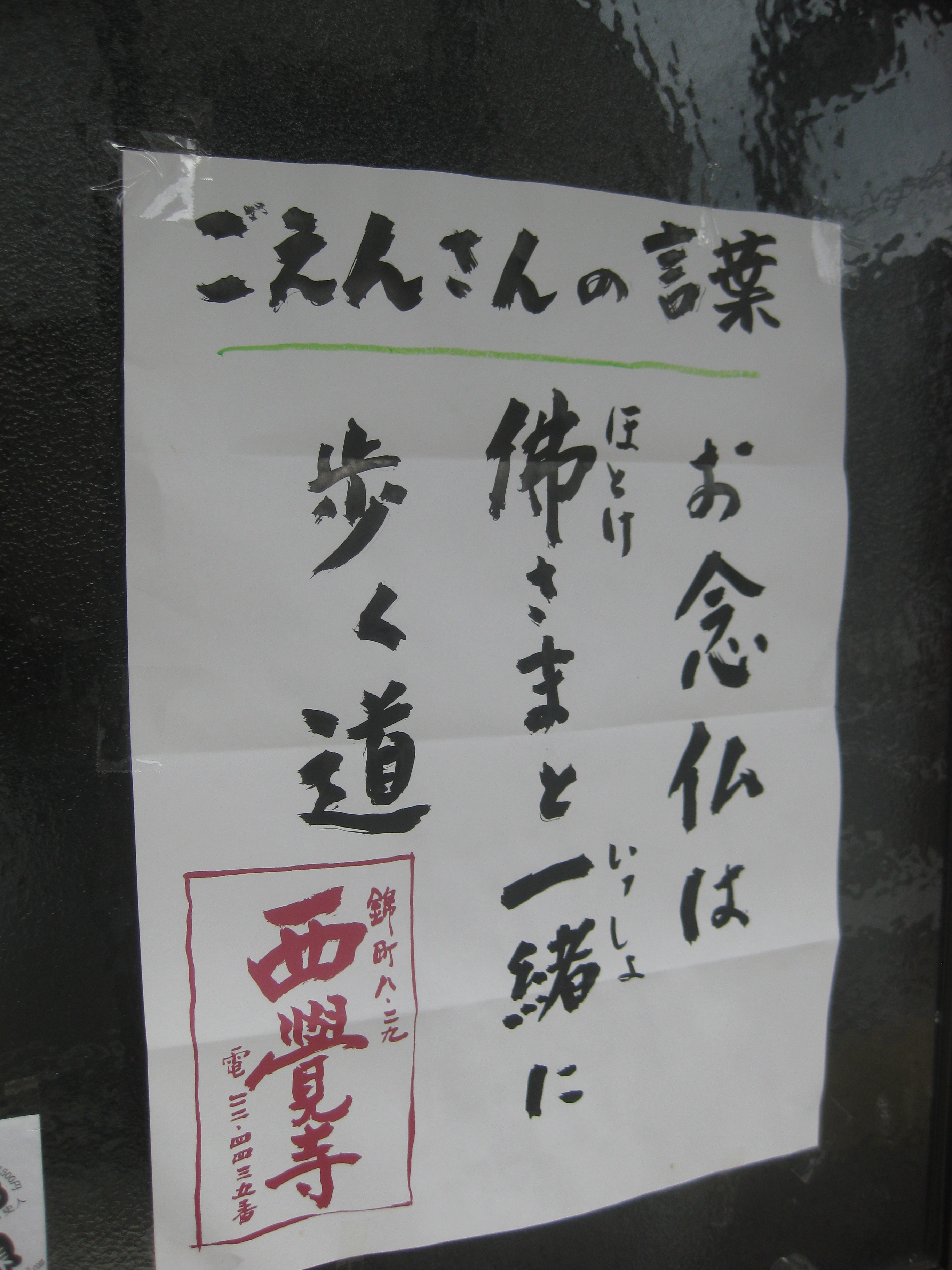 「ごえんさん」という方言が使われたポスター。滋賀県彦根市にて。